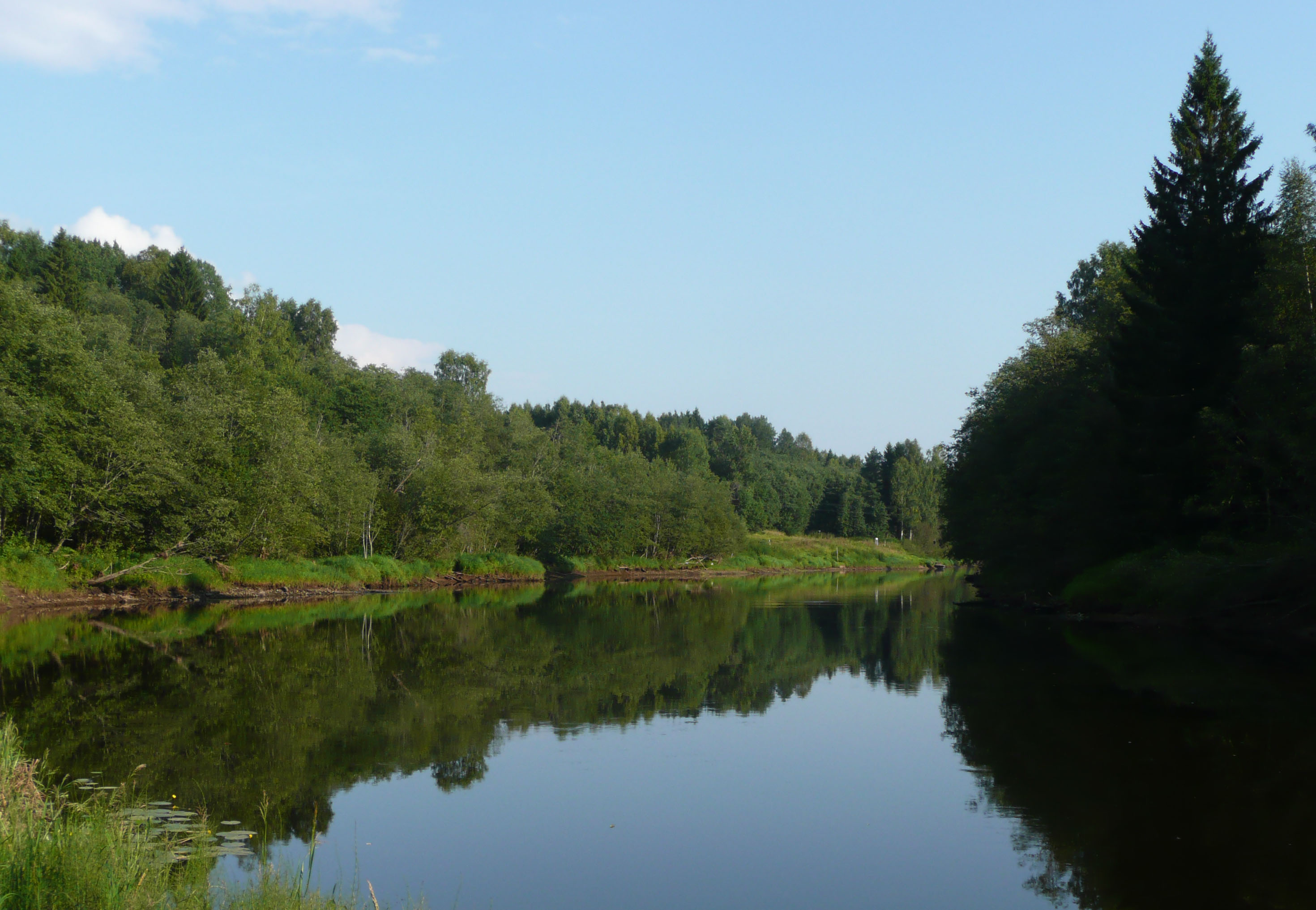 Волга у д.Вышегород Селижаровского района